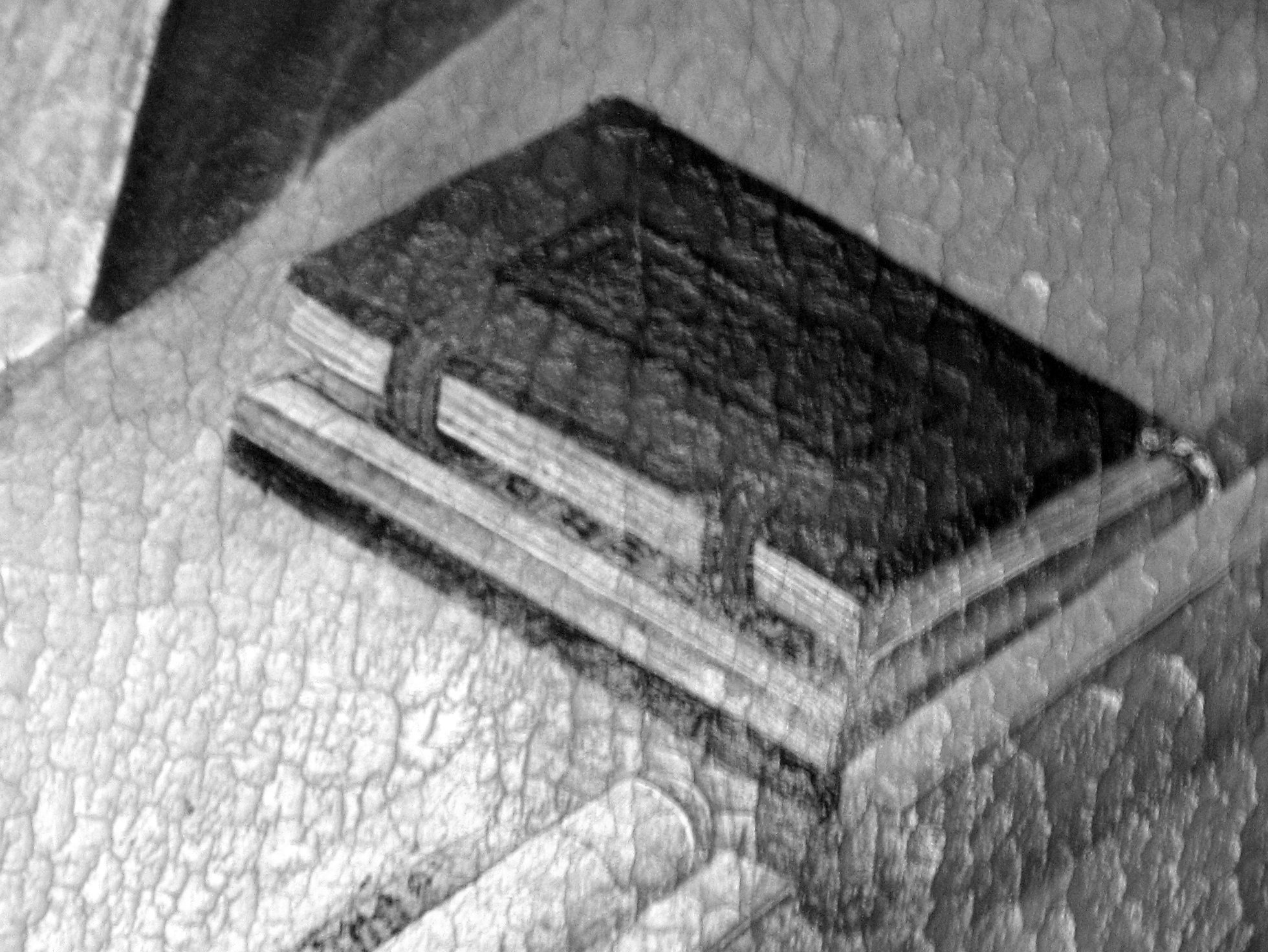 Dortmund, Marienkirche, Marienaltar, Detail mit Signatur zwischen den Buchschließen